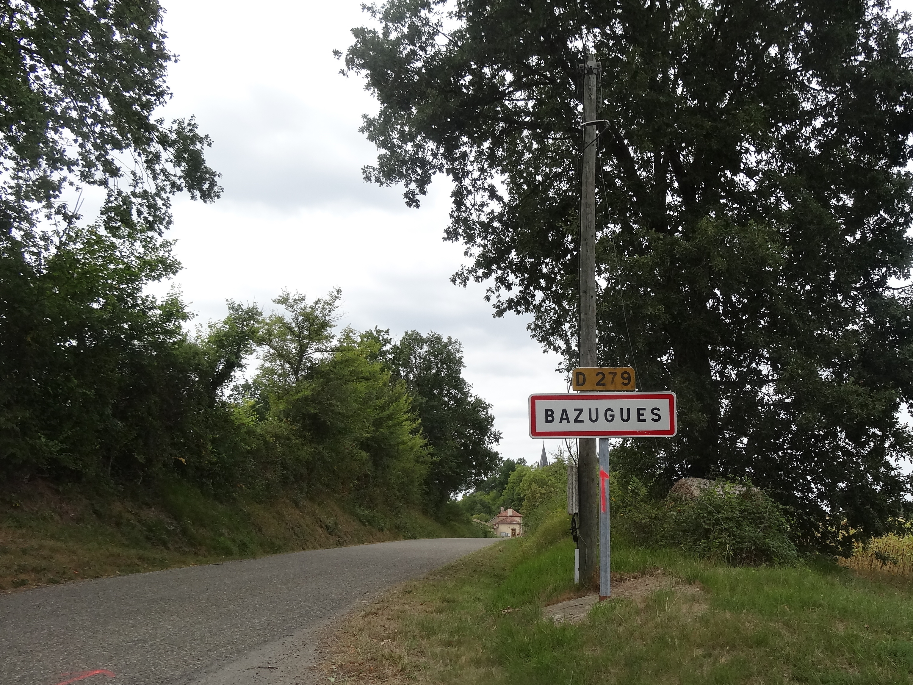 Entrée de Bazugues.